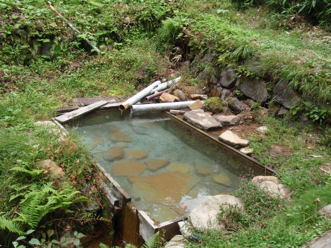 岩手県八幡平市にある野湯、安比高原温泉（正式名称不明）